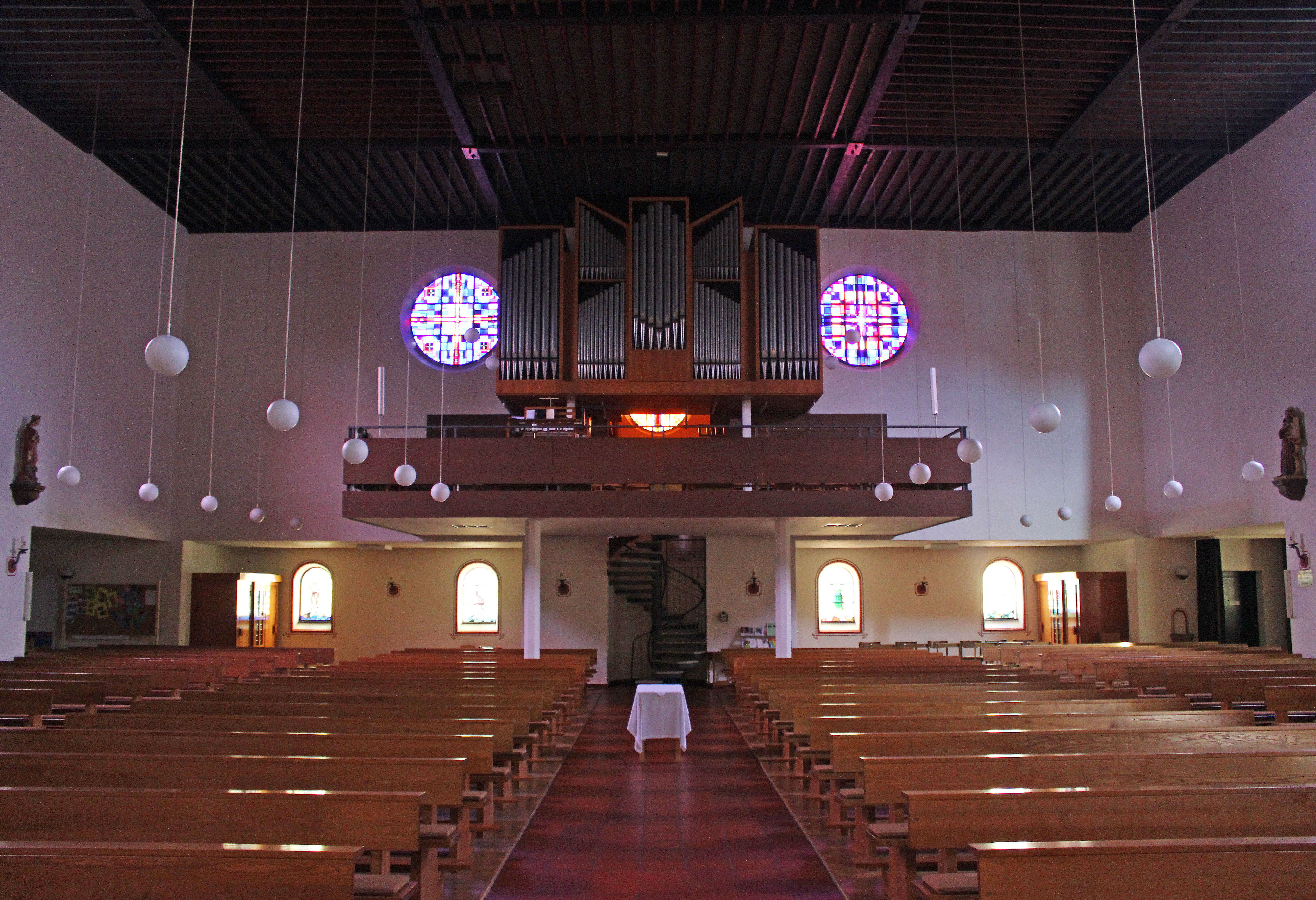 Blick ins Innere der katholischen Pfarrkirche St. Maria Magdalena in Brotdorf, einem Stadtteil von Merzig, Landkreis Merzig-Wadern, Saarland.